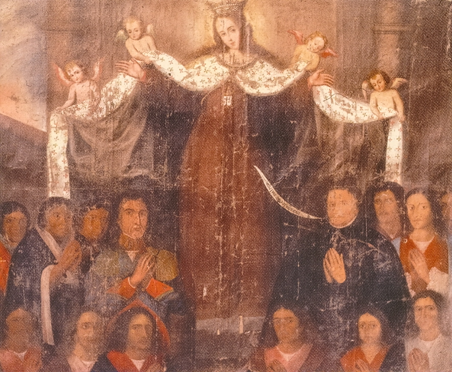 Obra también conocida como La familia de Túpac Amaru II. Diego Cristóbal Túpac Amaru sería uno de los personajes de la fila de arriba.